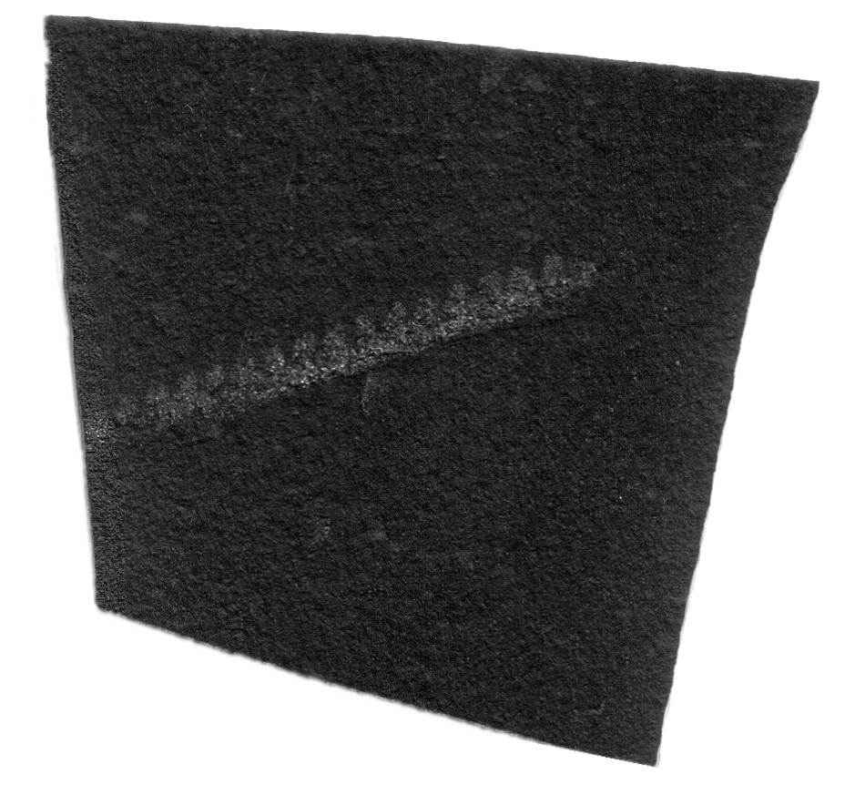 Schwarzschiefer (Alaunschiefer), ca. 10 cm², mit Graptolith (Monograptus) aus dem Alaunwerk Mühlwand bei Reichenbach/Vogtland